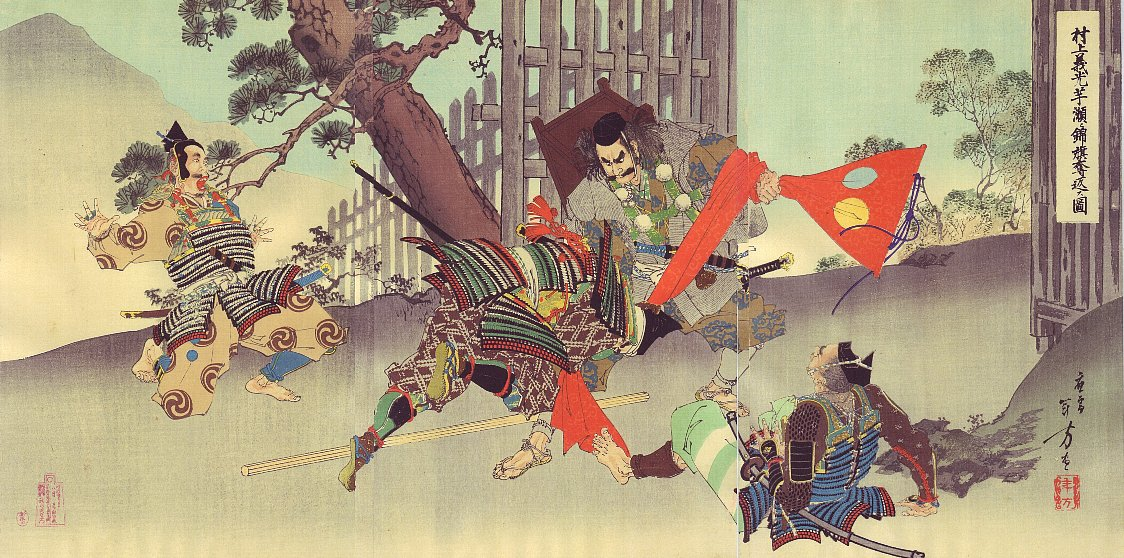 「村上義光芋瀬ニ綿旗奪返ス図」、3枚揃大判錦絵